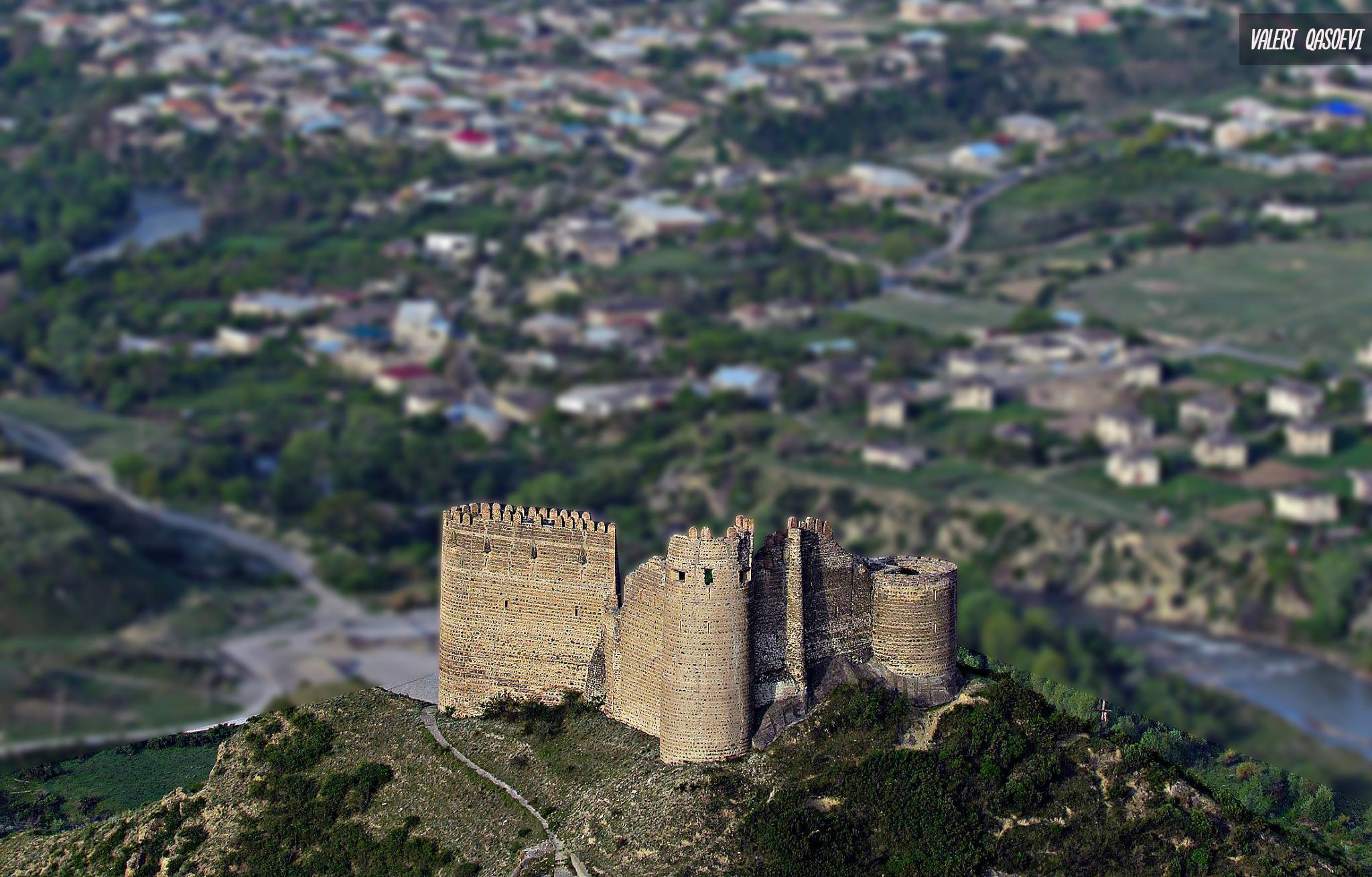 ქსნის ციხე